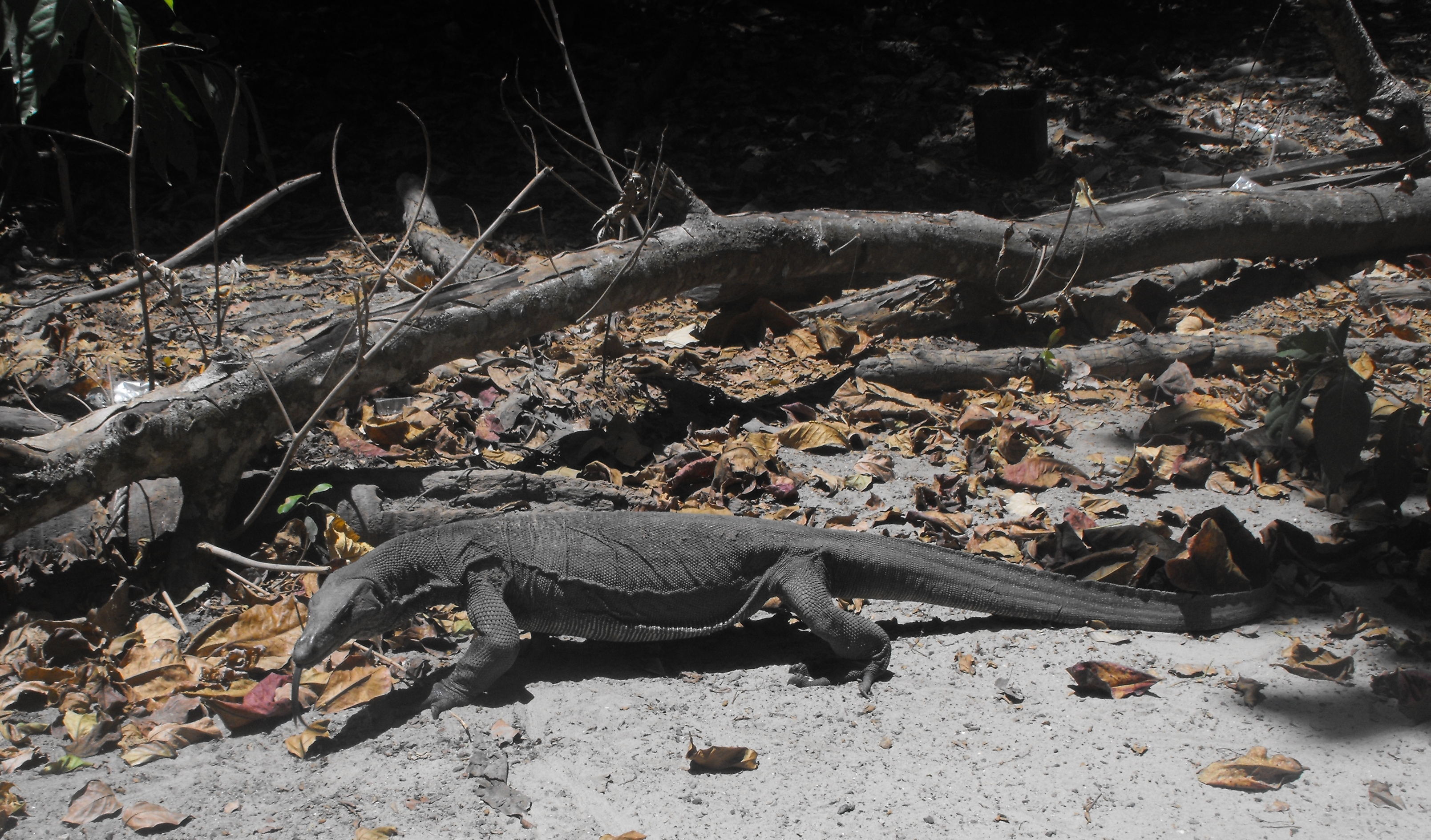 Monitor lizard - Pulau Sapi - Sabah - Borneo - Malaysia